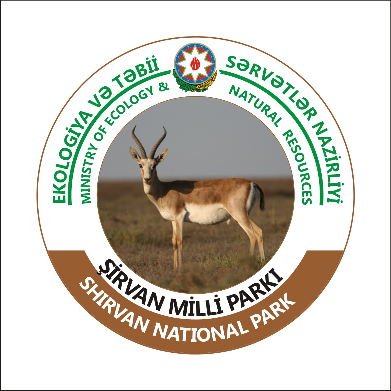 Milli Parkın loqosu